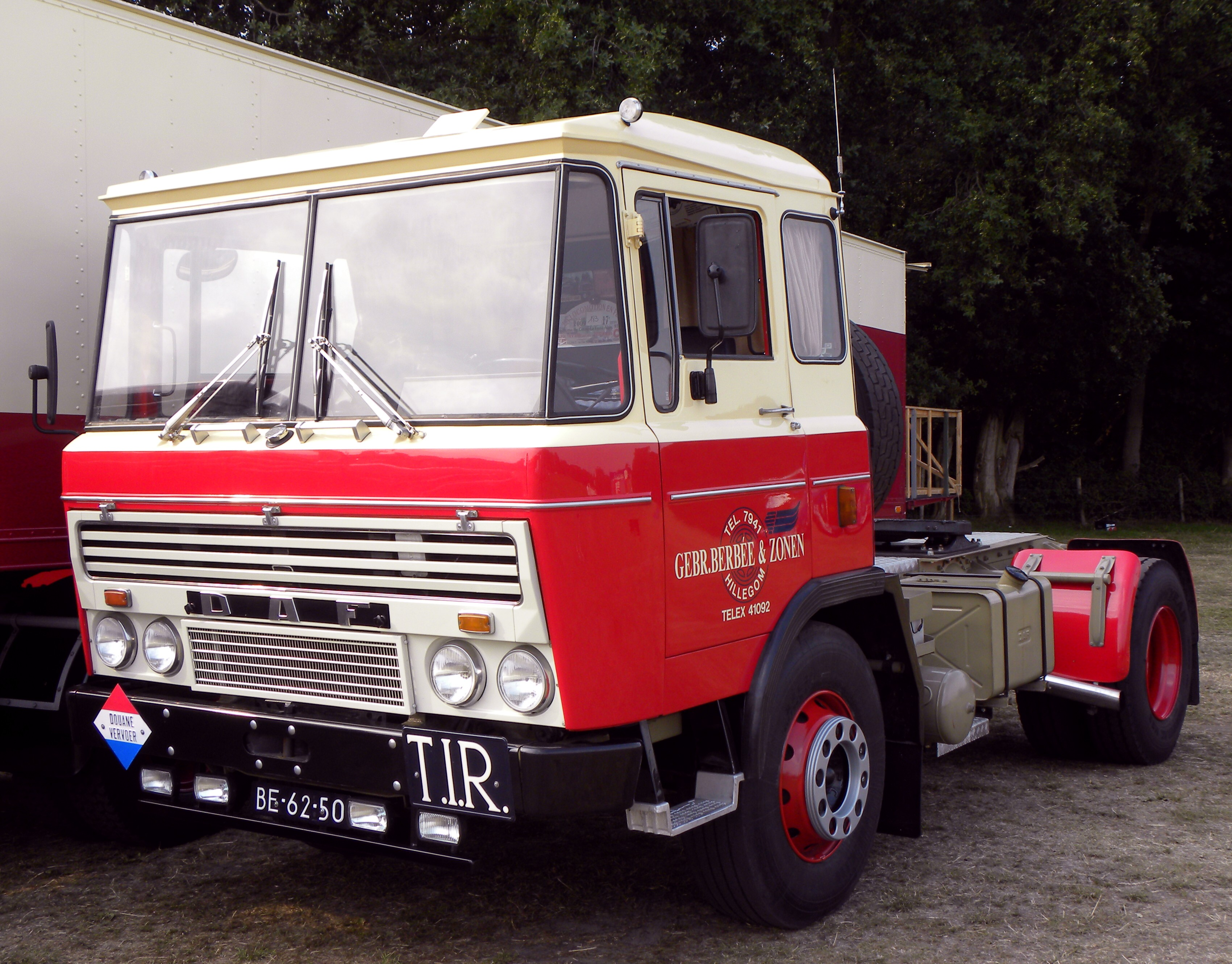 Daf FT 2605 DKA 360